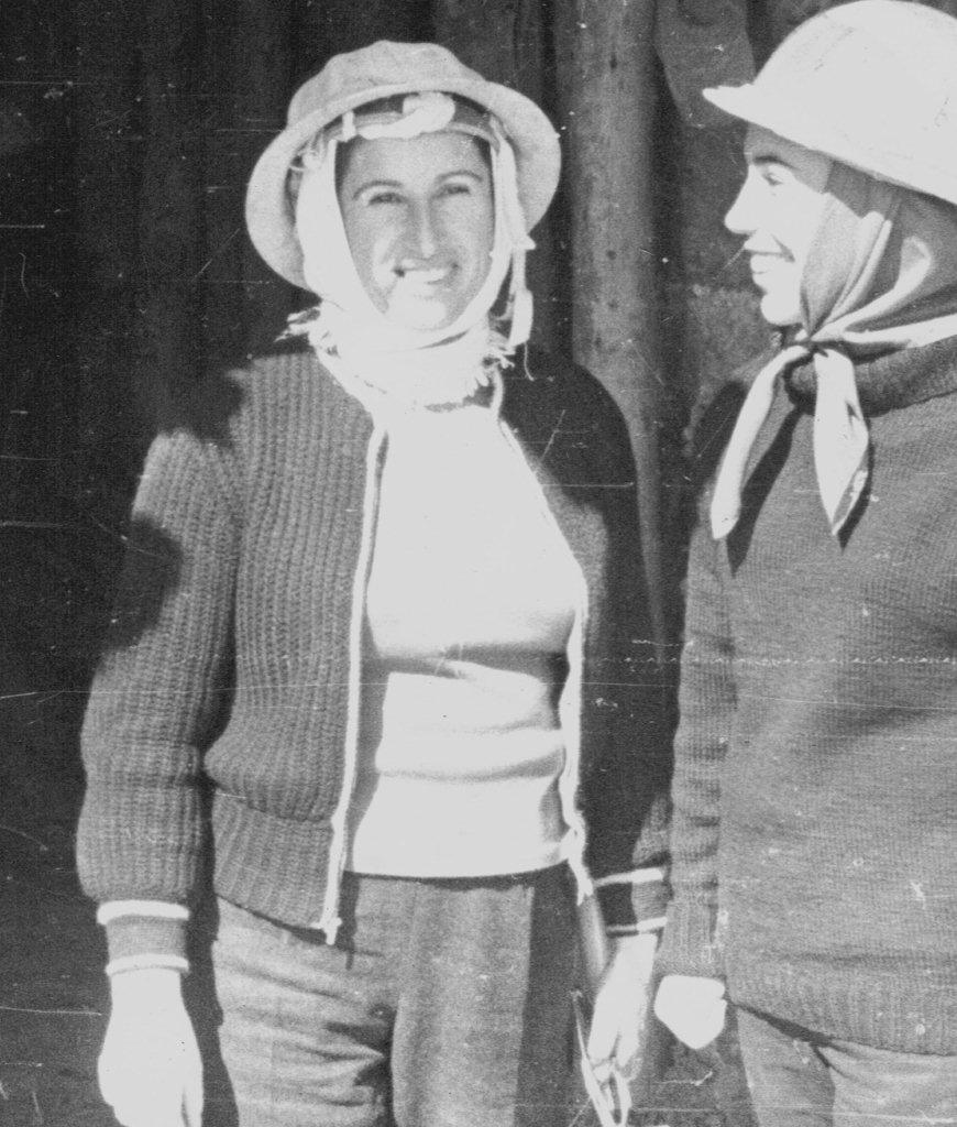 שולמית גרוס בעבודה